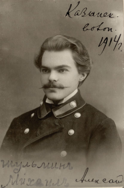 Епископ Ириней (Шульмин) в бытность выпускником Казанской духовной академии